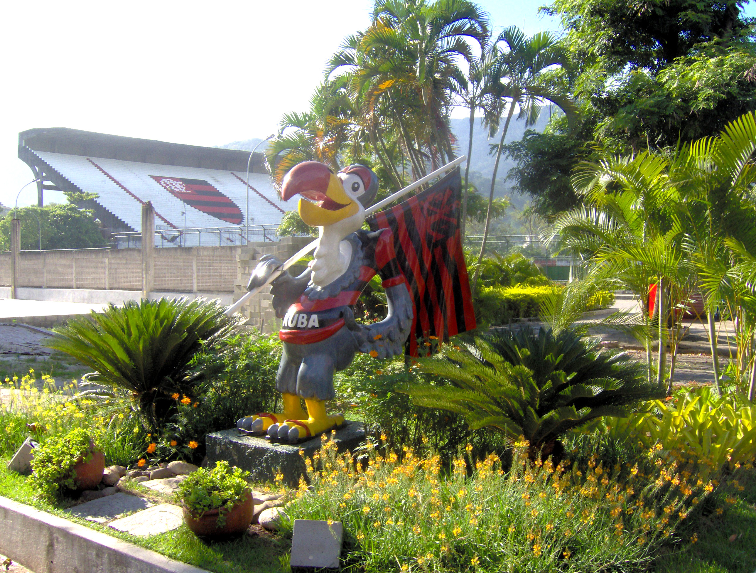 Estátua do Uruba, mascote do Clube de Regatas do Flamengo, na sede do clube na Gávea, Rio de Janeiro.